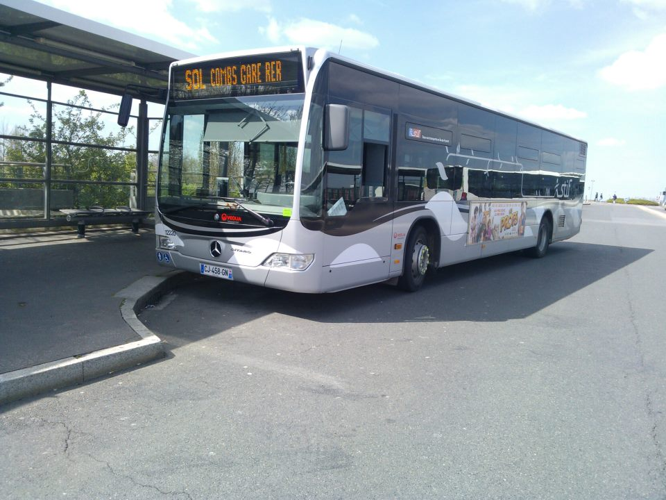 Citaro II Facelift N°12220 de la ligne SOL à la Gare de Lieusaint - Moissy